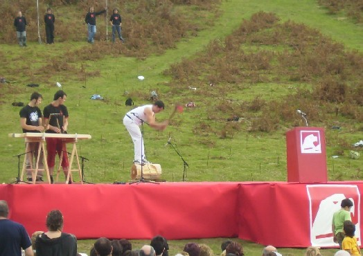 Gudari Eguna 2006. En el escenario, un aizkolari corta un tronco mientras dos esperan para tocar la txalaparta. Aritxulegi, Oiartzun, Guipúzcoa, España.